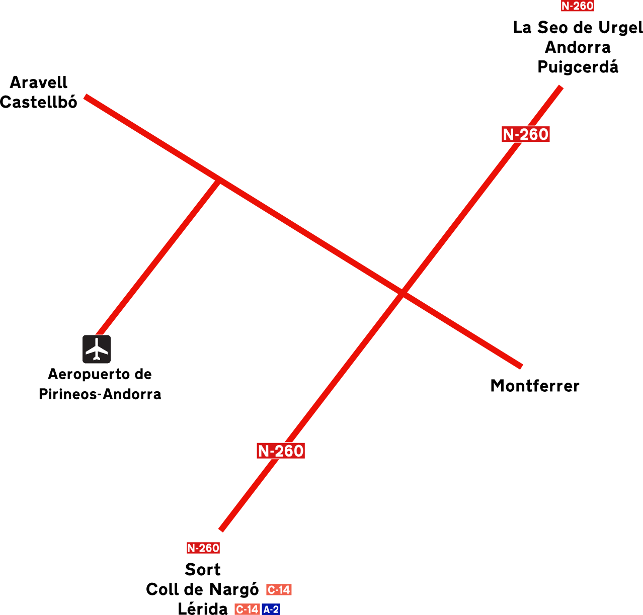 Mapa esquemático de accesos al Aeropuerto de Pirineos-Andorra (en español)